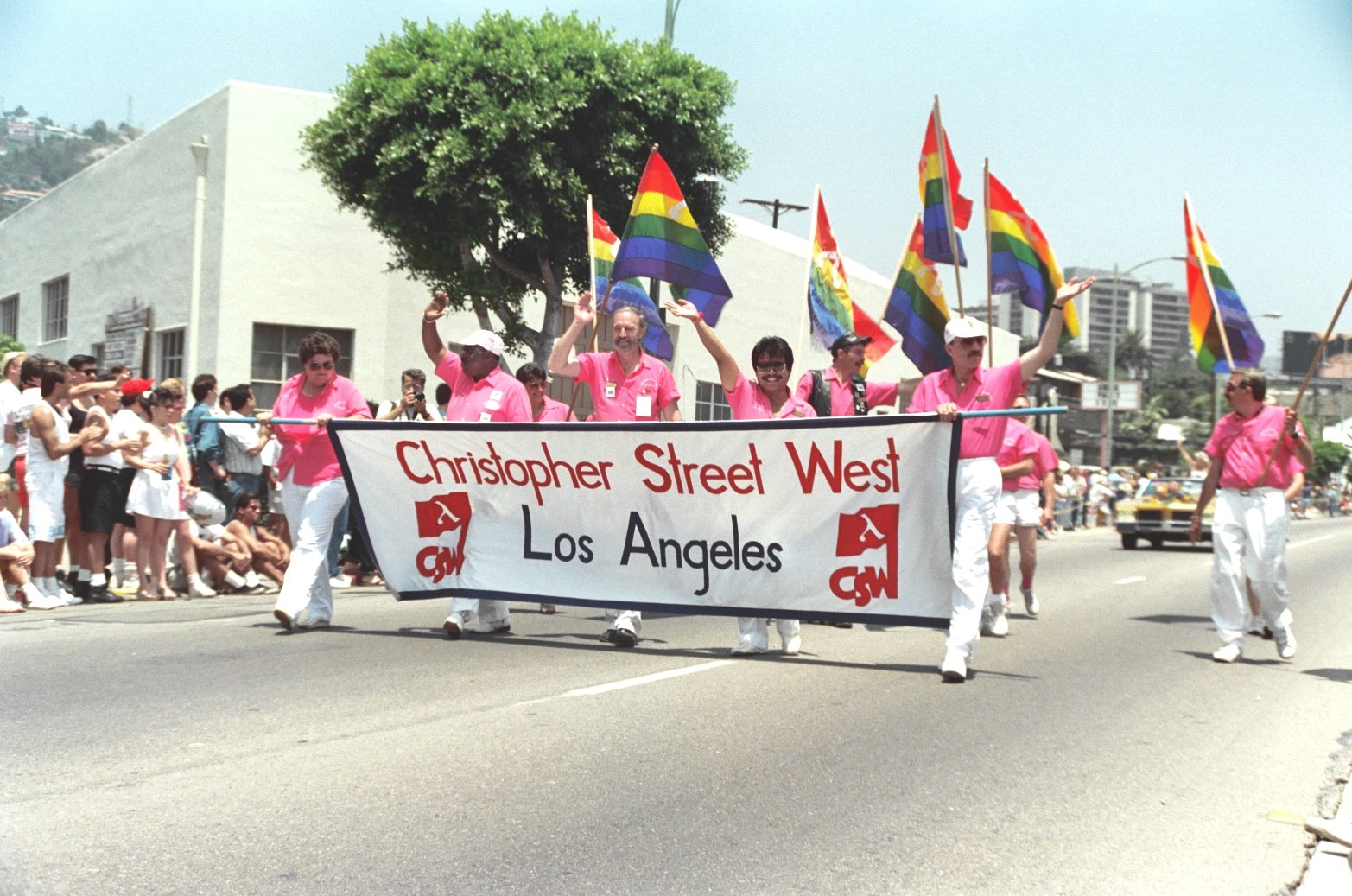 Los Angeles, June 1987